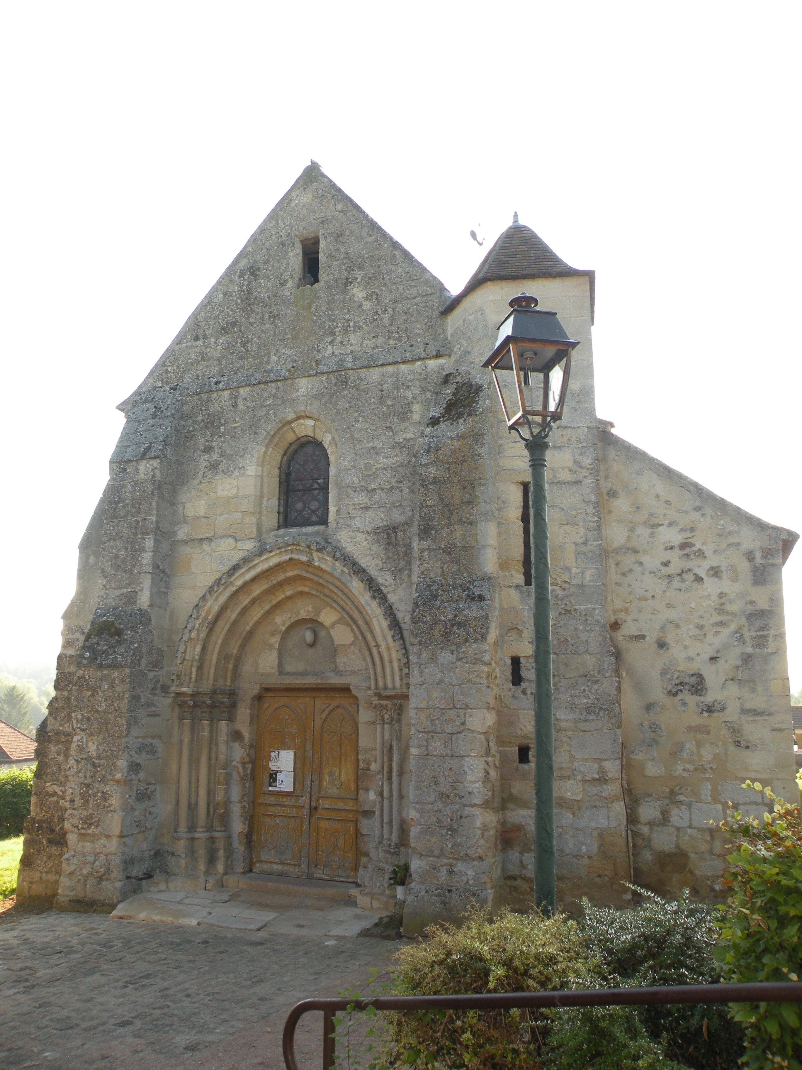 eglise de Vallangoujard